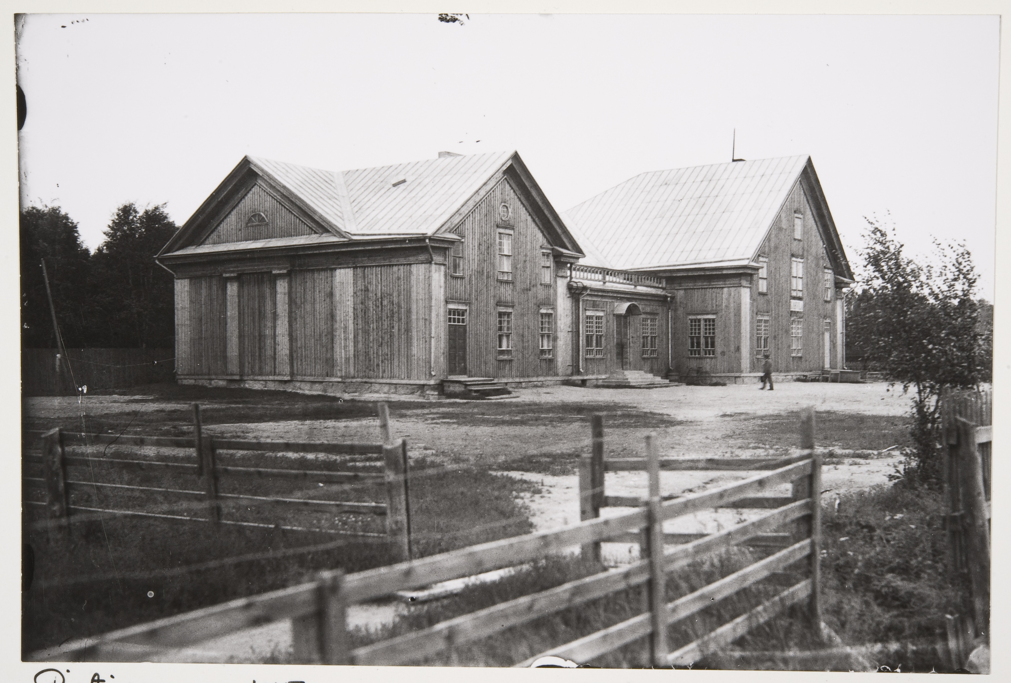 Lapuan työväentalo vuonna 1930